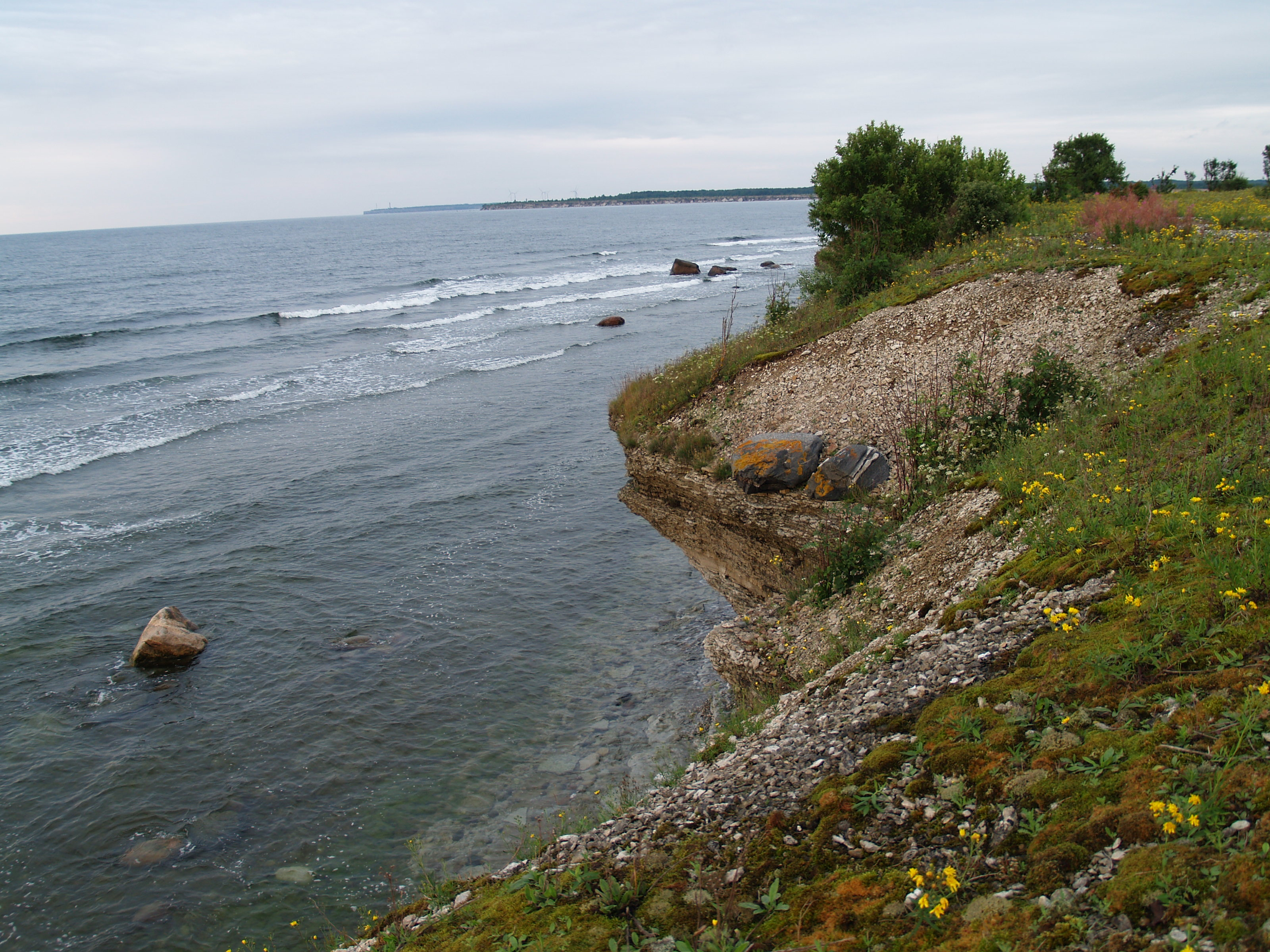 Suur-Pakri pank pangalt